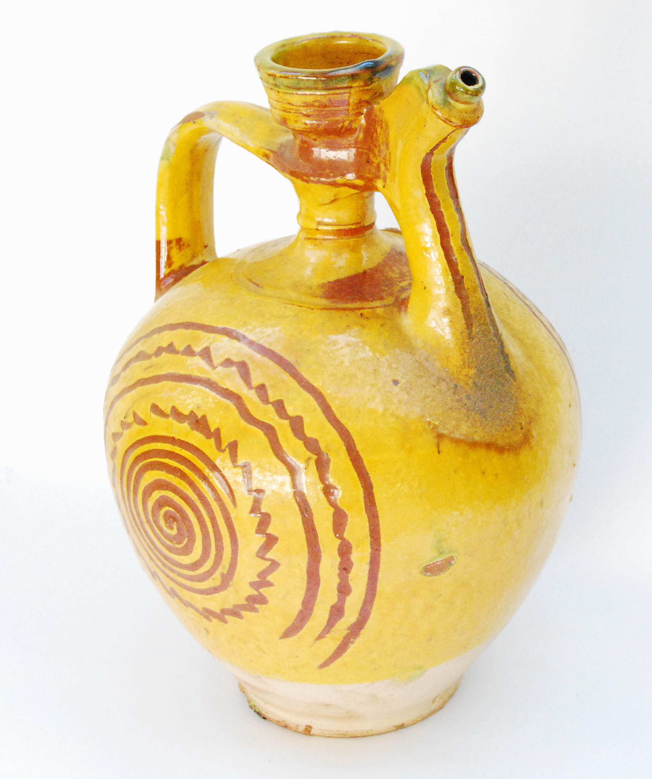 Srpski (latinica): Bardak „kondir“ iz perioda XIX-XX vek. Otkup M. Stamenković, selo Babičko. Ovaj zemljani sud najčešće je korišćen za svadbe, kićenje cvećem i novcem. Deo je zbirke grnčarija (keramika) Narodnog muzeja u Leskovcu.